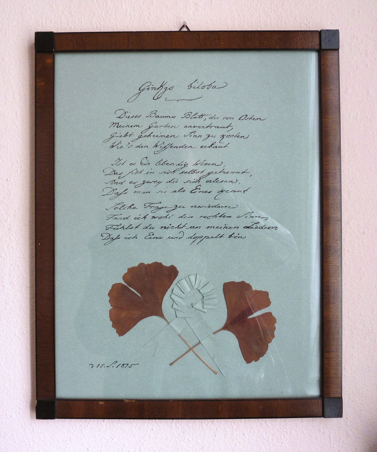 Frankfurt am Main, Stadtteil Sachsenhausen: Das Willemer-Häuschen oder Willemer-Gartenhaus ist ein klassizistisches Gartenhaus aus dem frühen 19. Jahrhundert. Bekannt wurde es durch die dortigen Begegnungen des Dichters Johann Wolgang von Goethe mit Marianne von Willemer im Jahr 1814. Im Zweiten Weltkrieg wurde das Originalgebäude zerstört und anschließend am selben Ort originalgetreu wieder aufgebaut. Heute befindet sich im Haus eine Goethe-Gedenkstätte. Das Foto zeigt ein gerahmtes Faksimile der Goethe-Handschrift seines Gedichtes Ginkgo biloba (auch Gingo biloba), verziert mit zwei Ginkgo-Blättern. Das Original sandte Goethe im Jahr 1815 an Marianne von Willemer